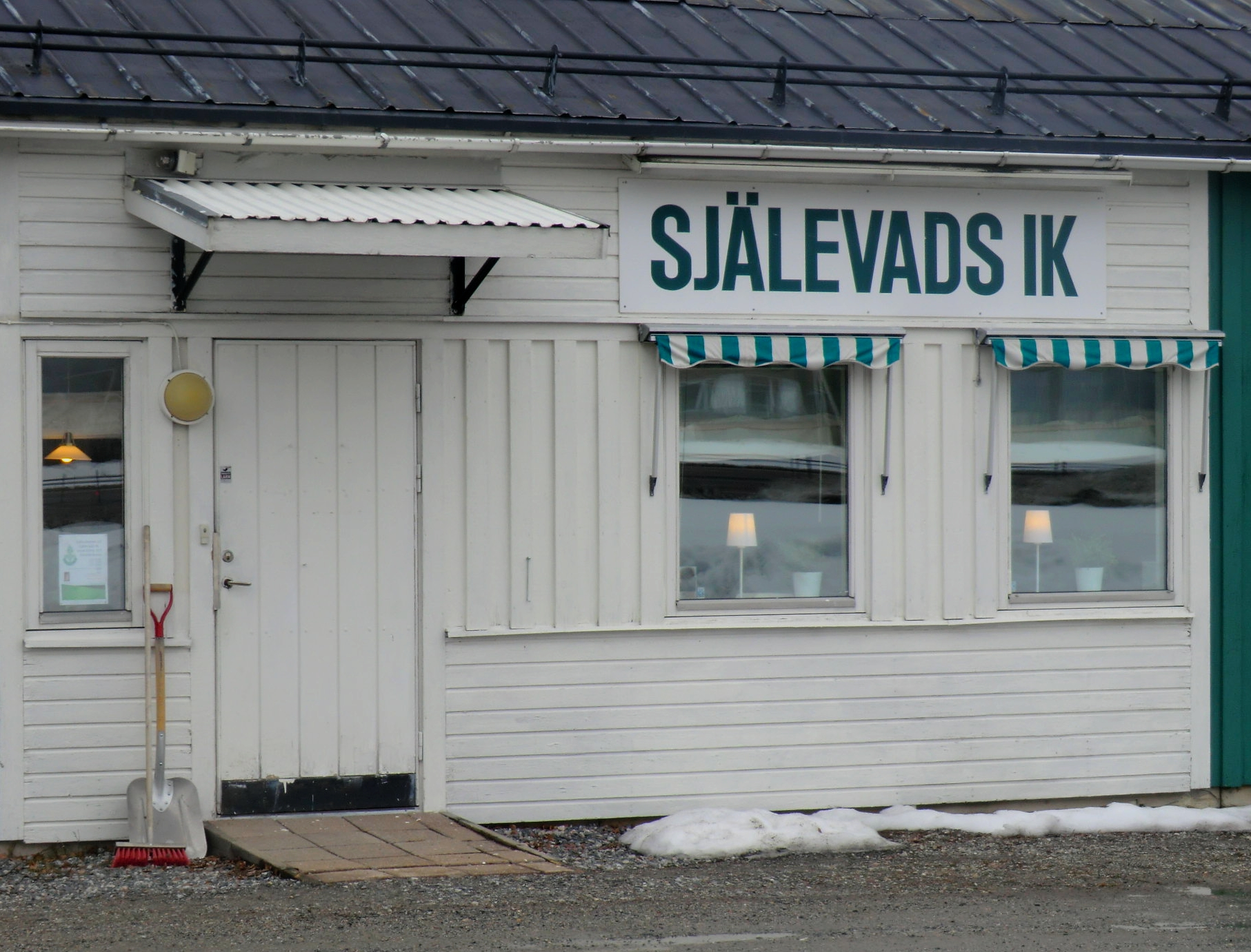 Klubbkontor för Själevads IK.